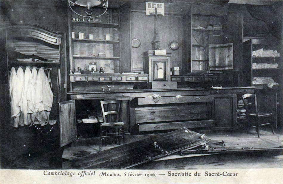 Inventaires de 1906 à Moulins (Allier-France) - Sacristie du Sacré-Cœur Scan d'une carte postale ancienne